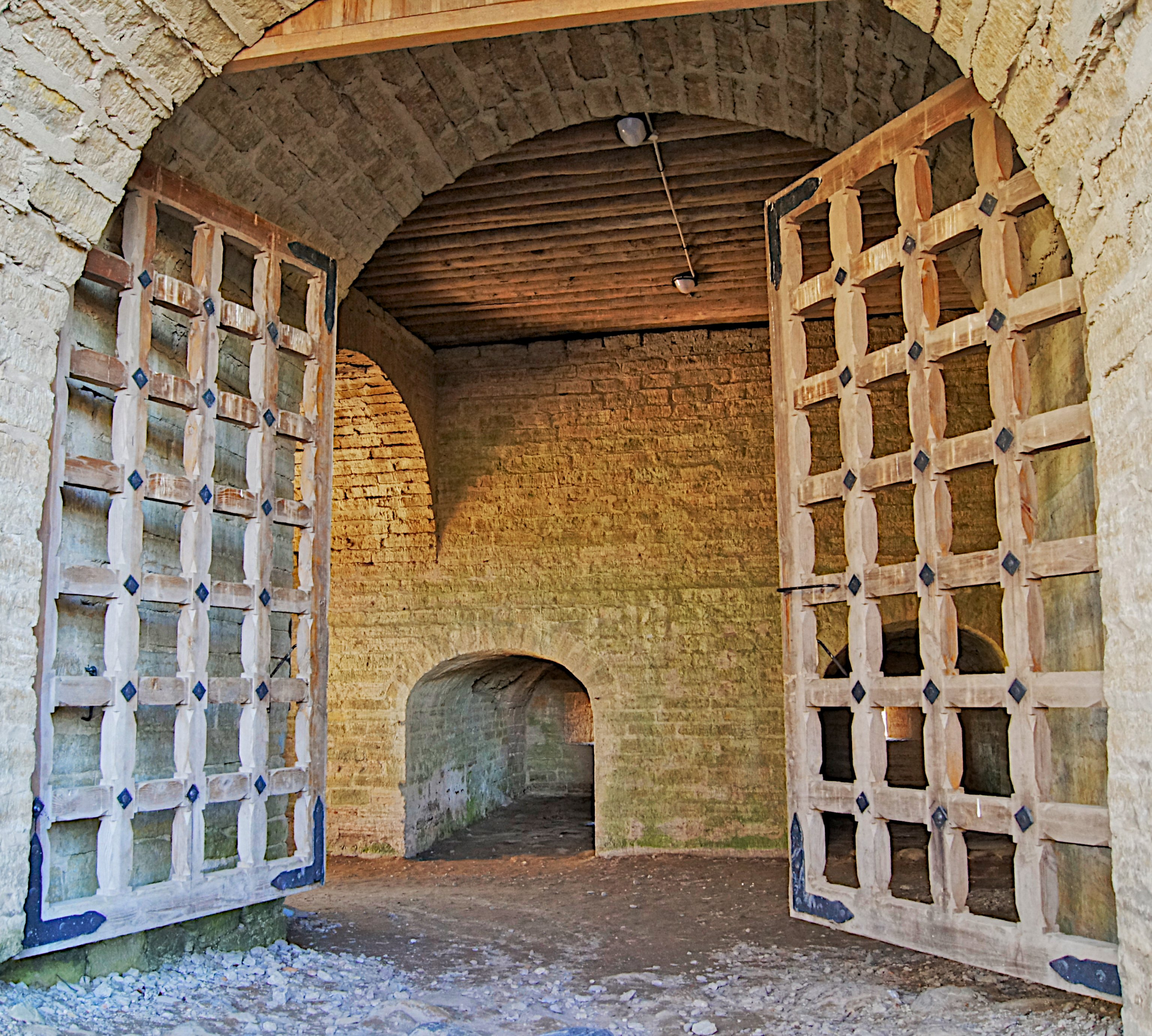 с. Старая Ладога, Староладожская крепость, Воротная башня. Вид с внутренней стороны крепости.